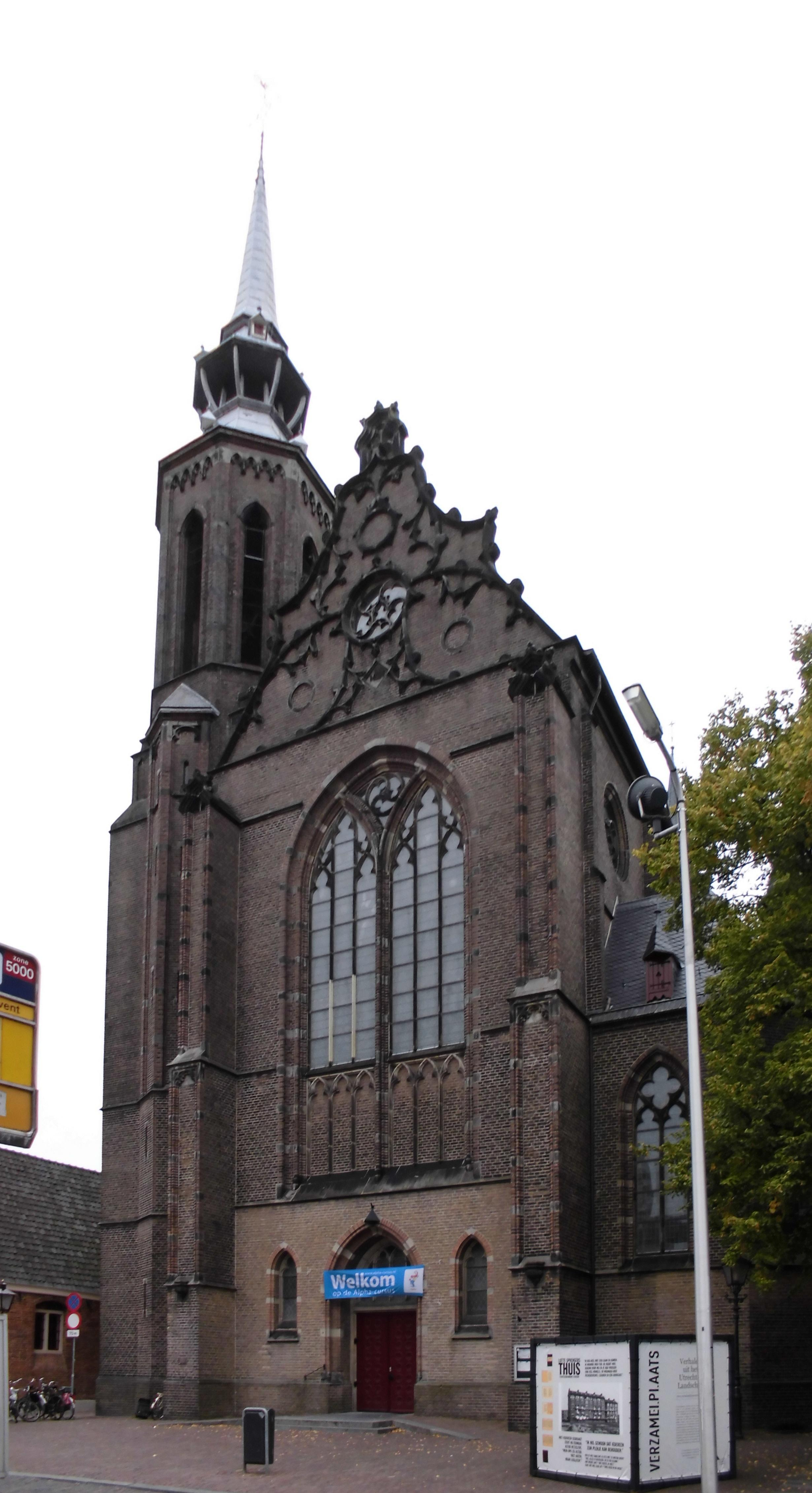 Sint Catharinakathedraal Utrecht